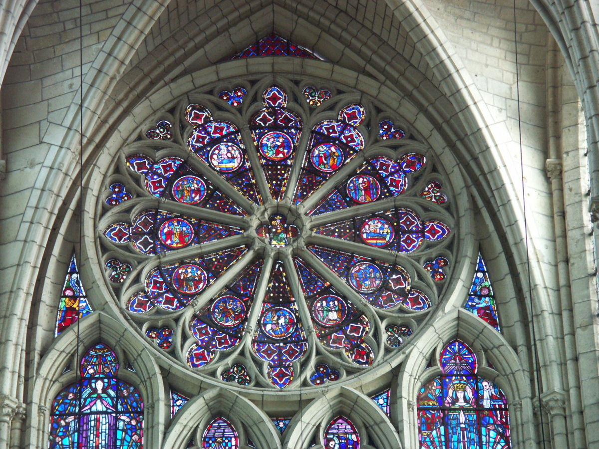 Cathédrale Saint-Gervais-et-Saint-Protais de Soissons, France - Rose window